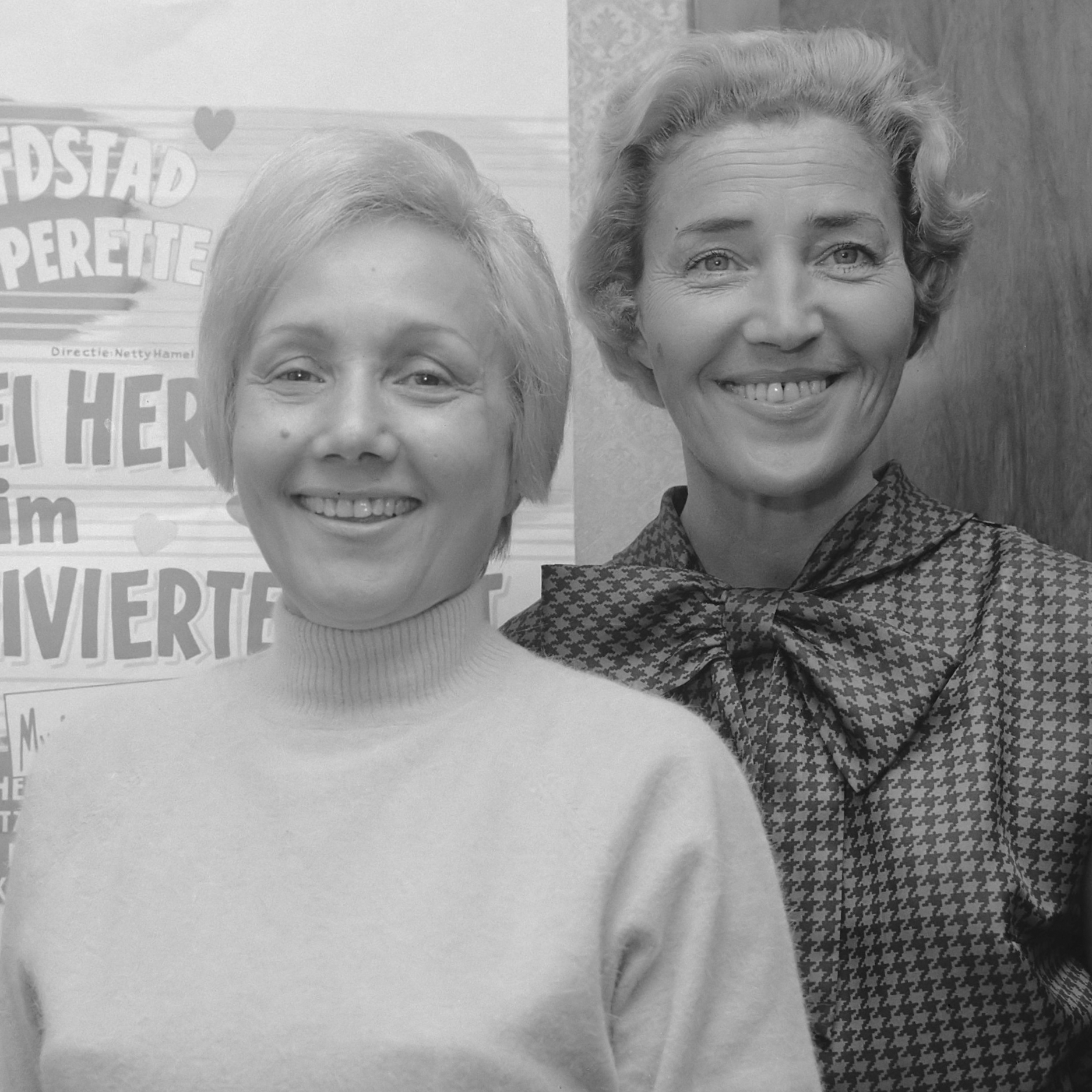 Hoofdstadoperette. Links mevrouw Hamel en rechts mevrouw Aurich voor de affiche; Zwei Herzen im Dreiviertel-Takt 30 augustus 1966